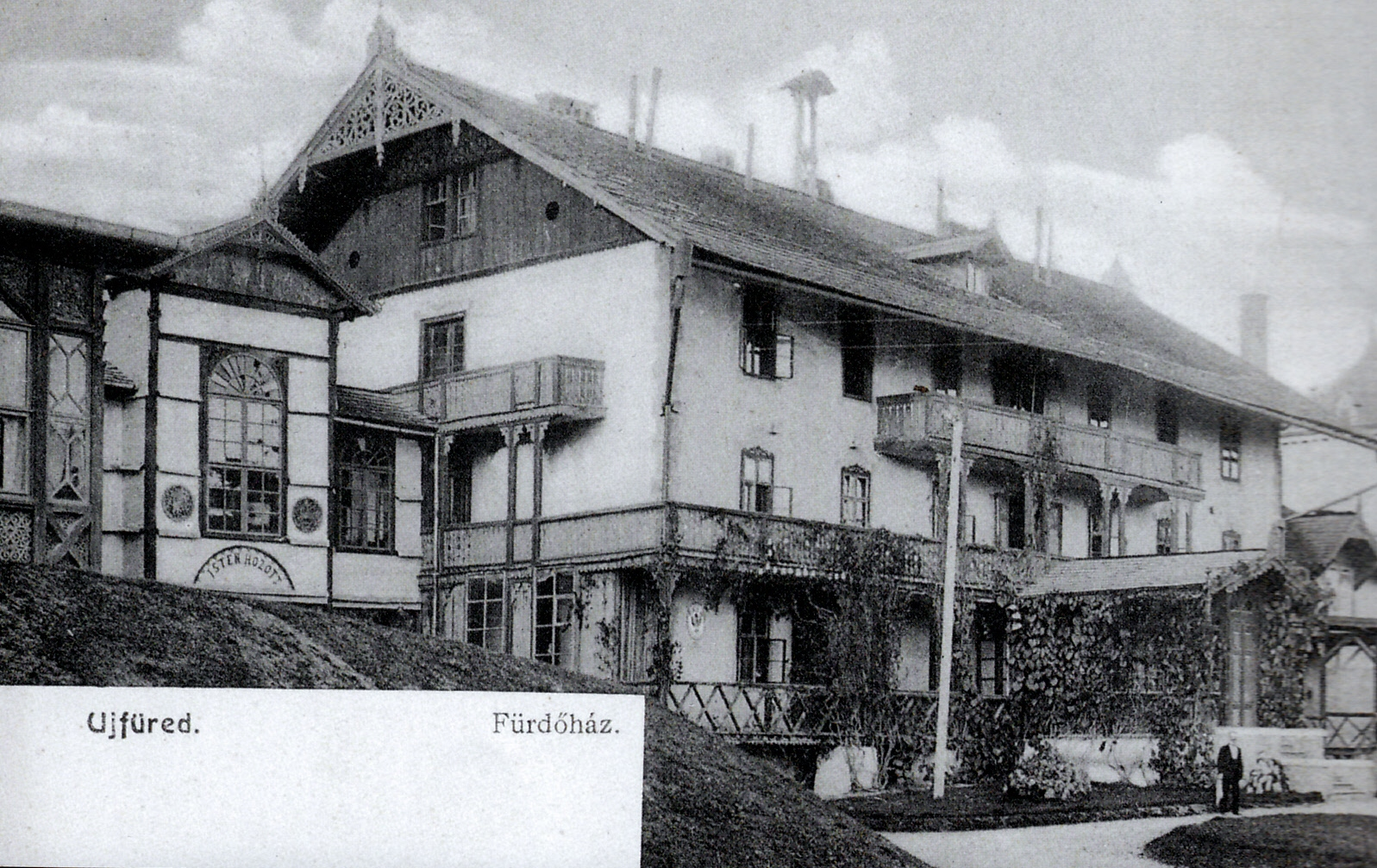 Staré sanatórium v Novom Smokovci. Prvá budova, ktorú v novozaloženej osade postavil Dr. Mikuláš Szontagh st.. Mala 27 izieb.